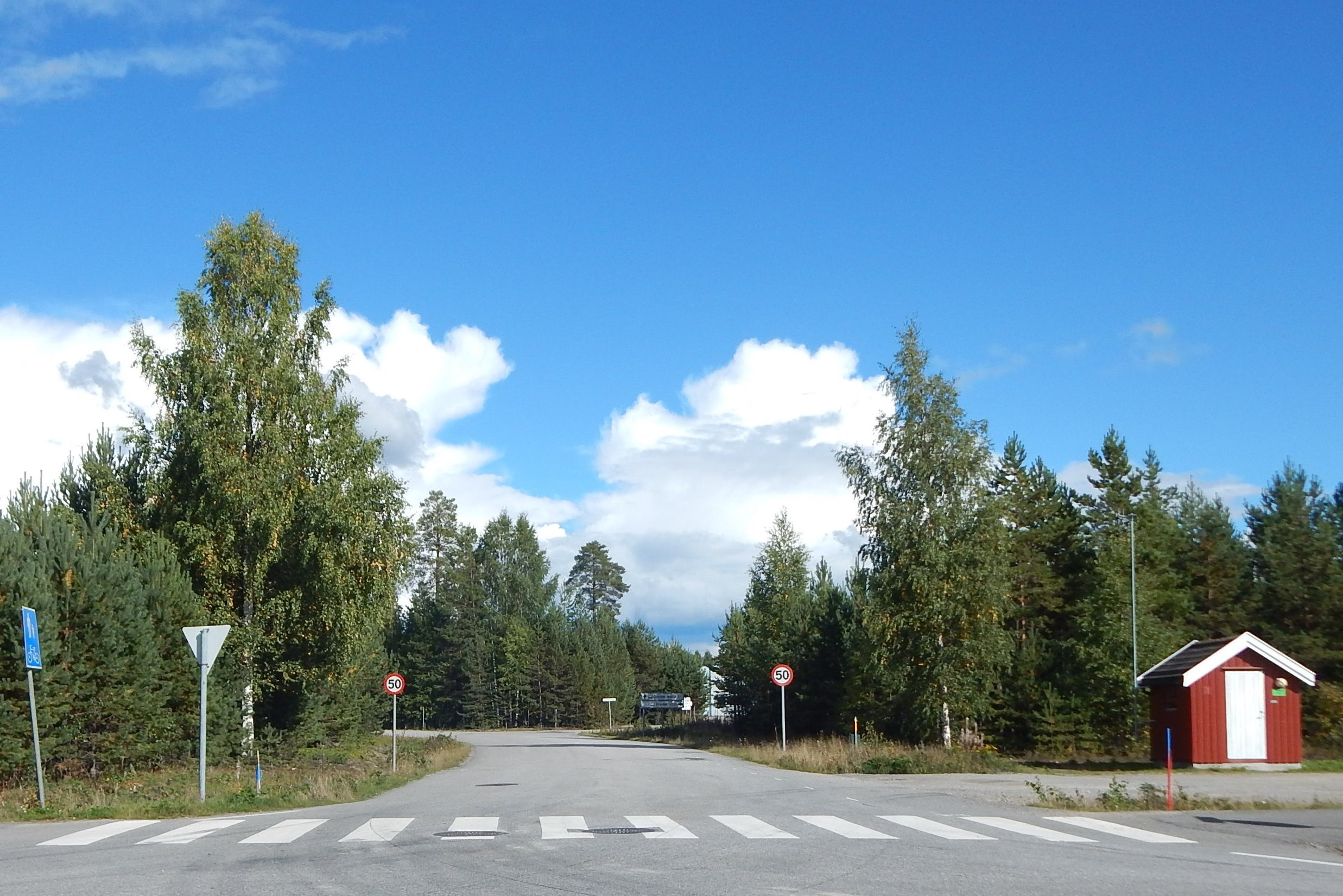 Grindervegen (fylkesvei 408) sett fra Solørvegen (riksvei 2)